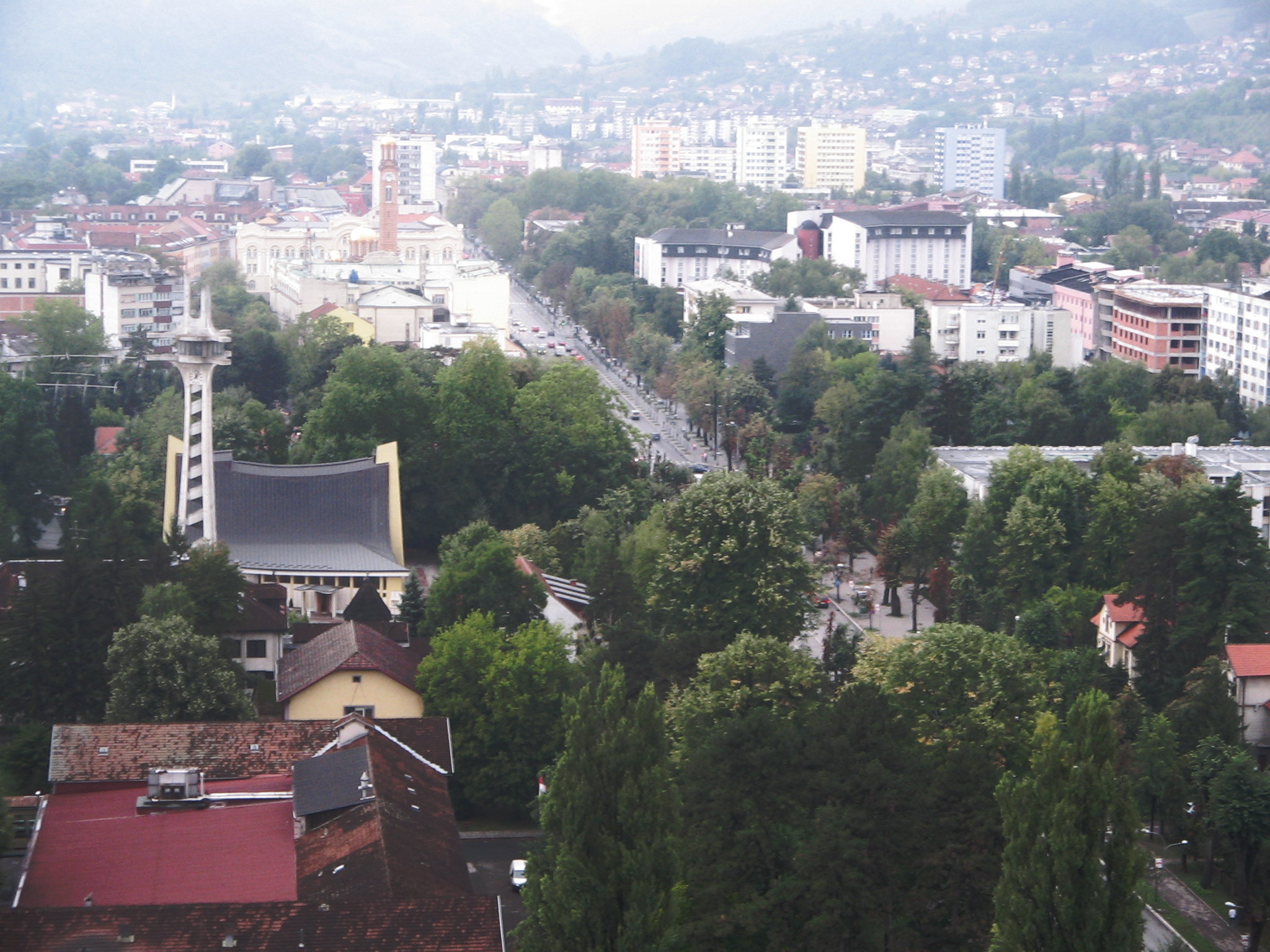 Поглед на центар Бање Луке са административног центара Владе Републике Српске.